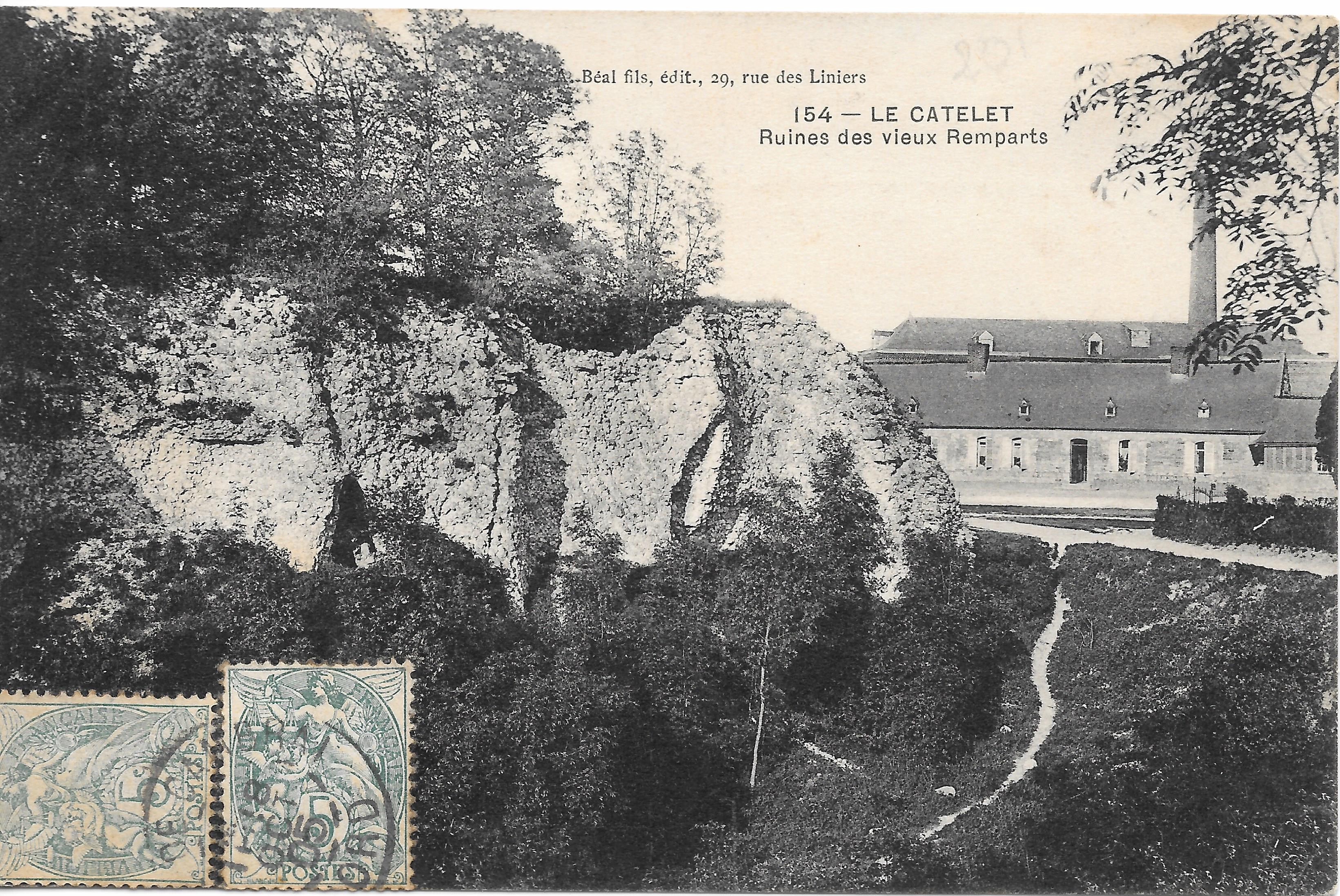 Carte postale